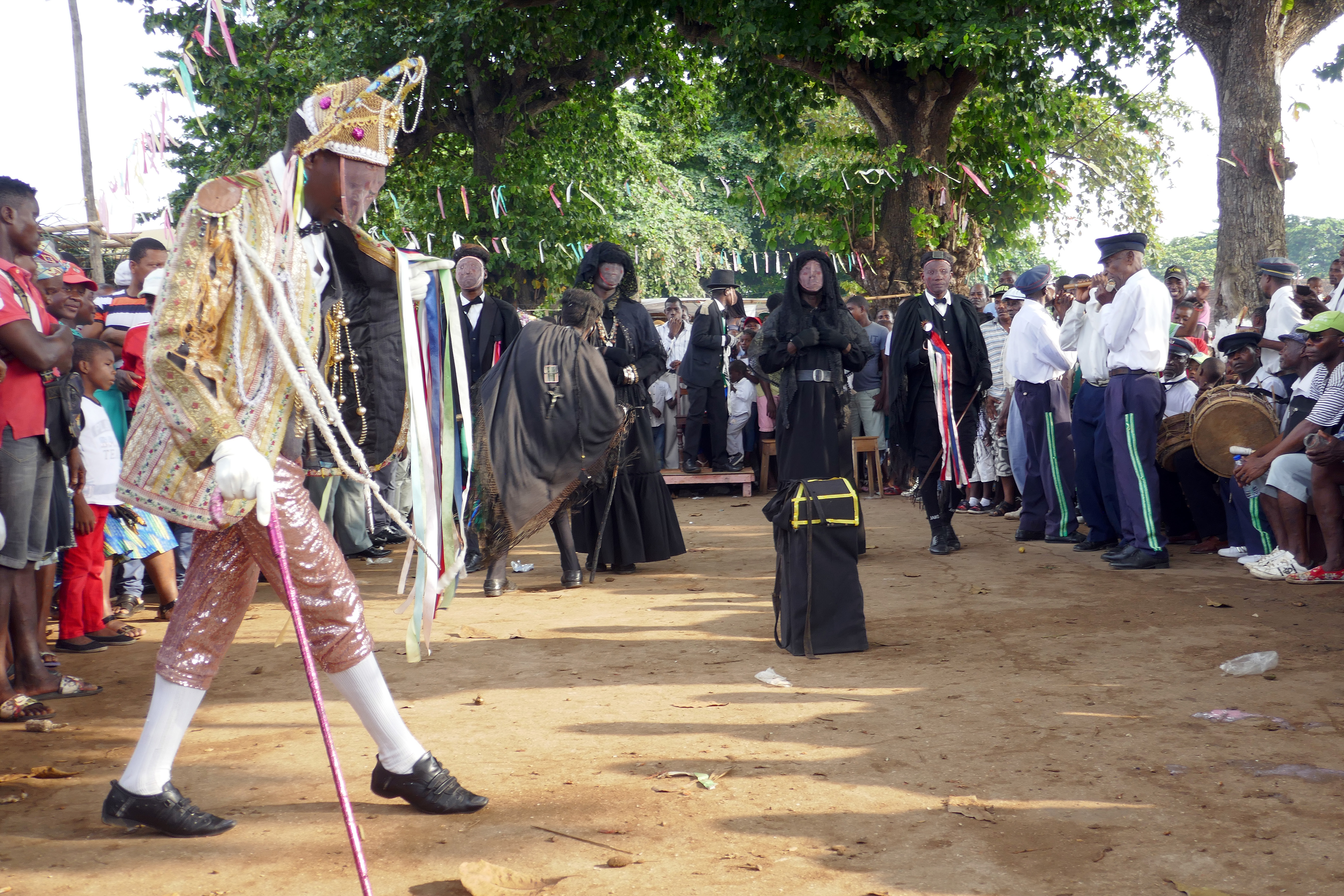 Tchiloli représenté devant l'église São Pedrão de São Tomé à l'occasion de la fête patronale. Le tchiloli est une forme théâtrale, musicale et dansée créée au XVIe siècle, jouée par des pêcheurs et des paysans. Traditionnellement elle met en scène la seule pièce du répertoire, La tragédie du marquis de Mantoue et de l'empereur Charlemagne". This is an image with the theme "Play" from: Sao Tome and Principe